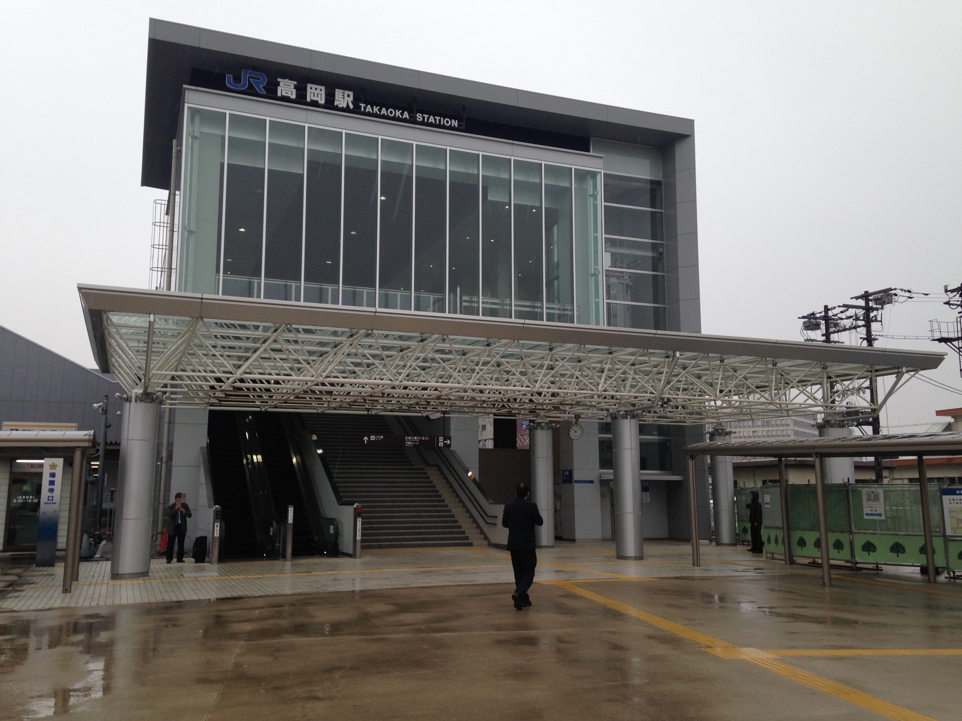 高岡駅南口